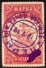 Почтовая марка Пермского Совдепа, использованная при администрации Колчака